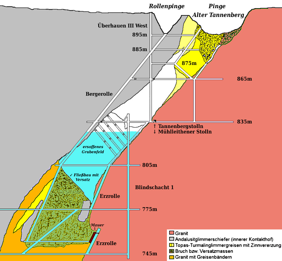 Vertikalschnitt durch die Lagerstätte Tannenberg